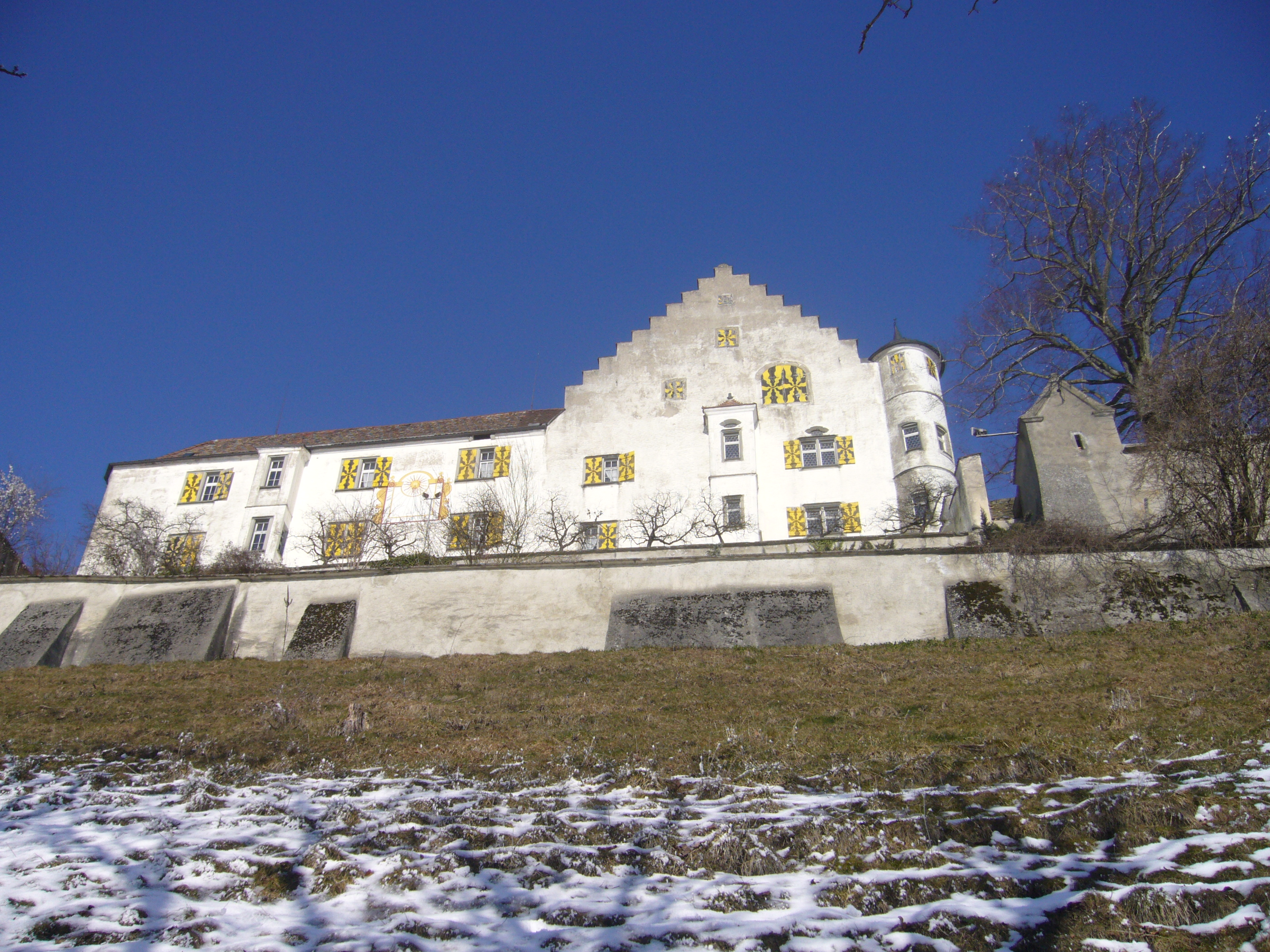 Süd-Façade des Schlosses Sonnenberg im Winter.